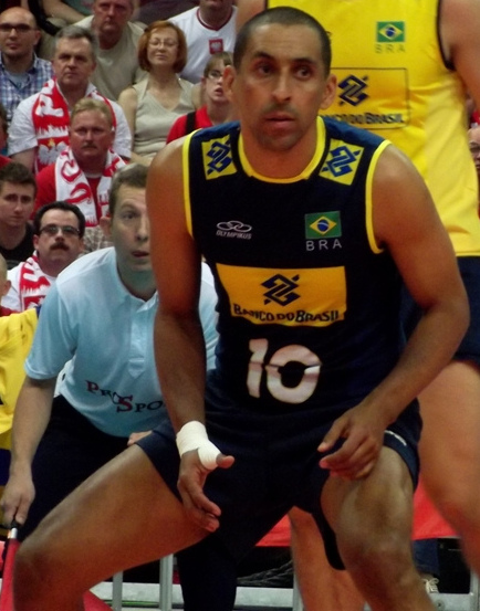 Zdjęcie zrobione podczas zawodów Ligi Światowej 2012 w katowickim Spodku.